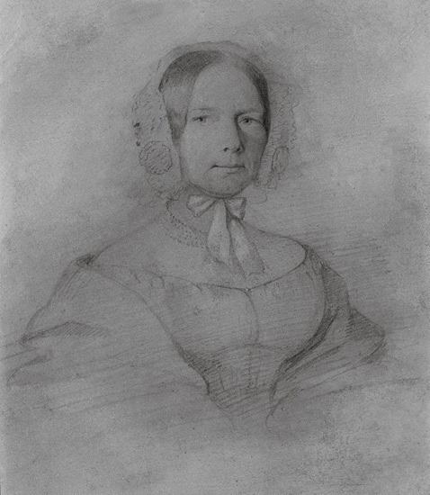 Anna Emilia Wiesiołowska z domu Skarbek (1793-1873), matka chrzestna Fryderyka Chopina, siostra Fryderyka Skarbka